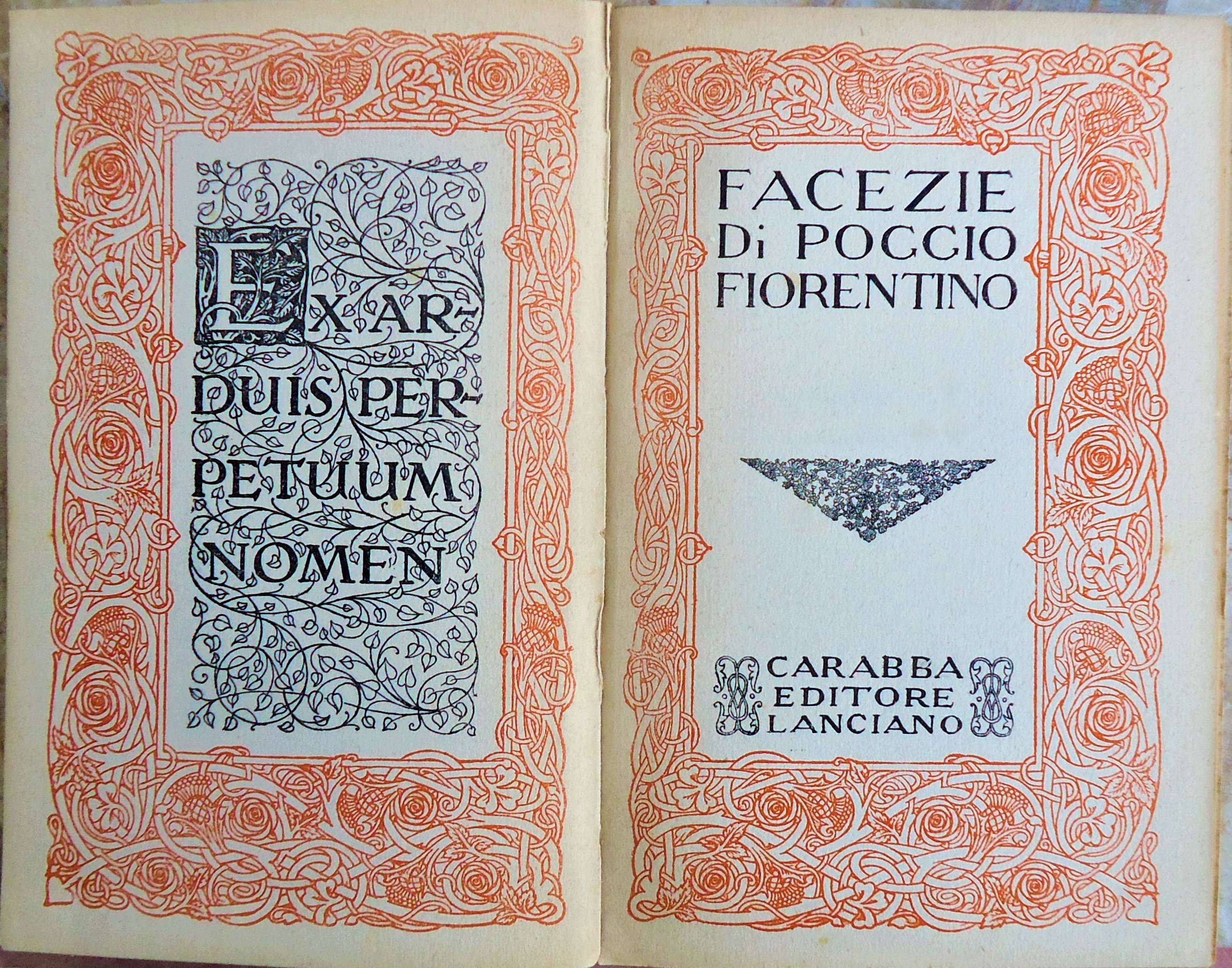 Collana Scrittori italiani e stranieri. Introduzione di Domenico Ciàmpoli.